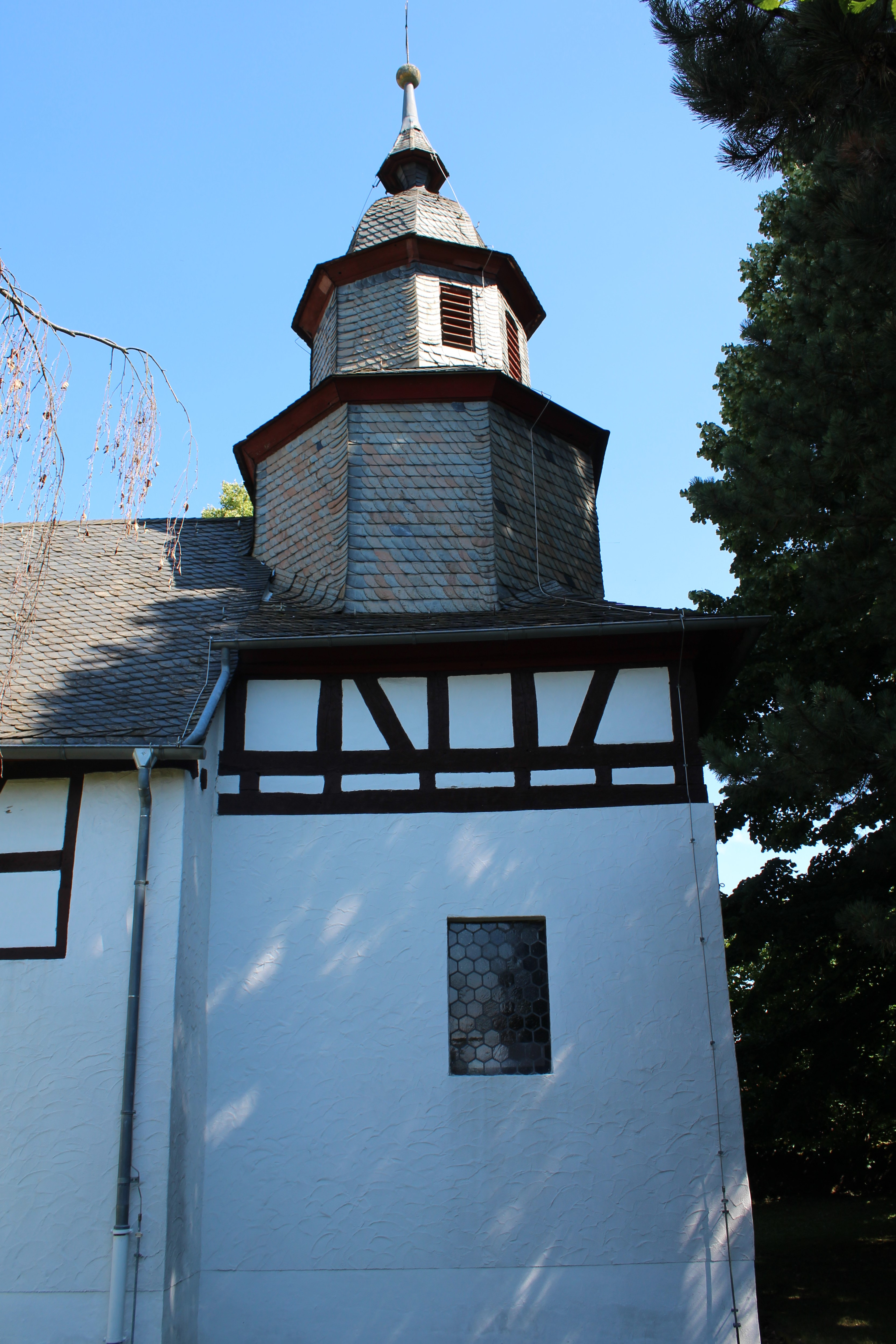 Evangelische Kapelle Oberndorf, Solms, Hessen, Deutschland